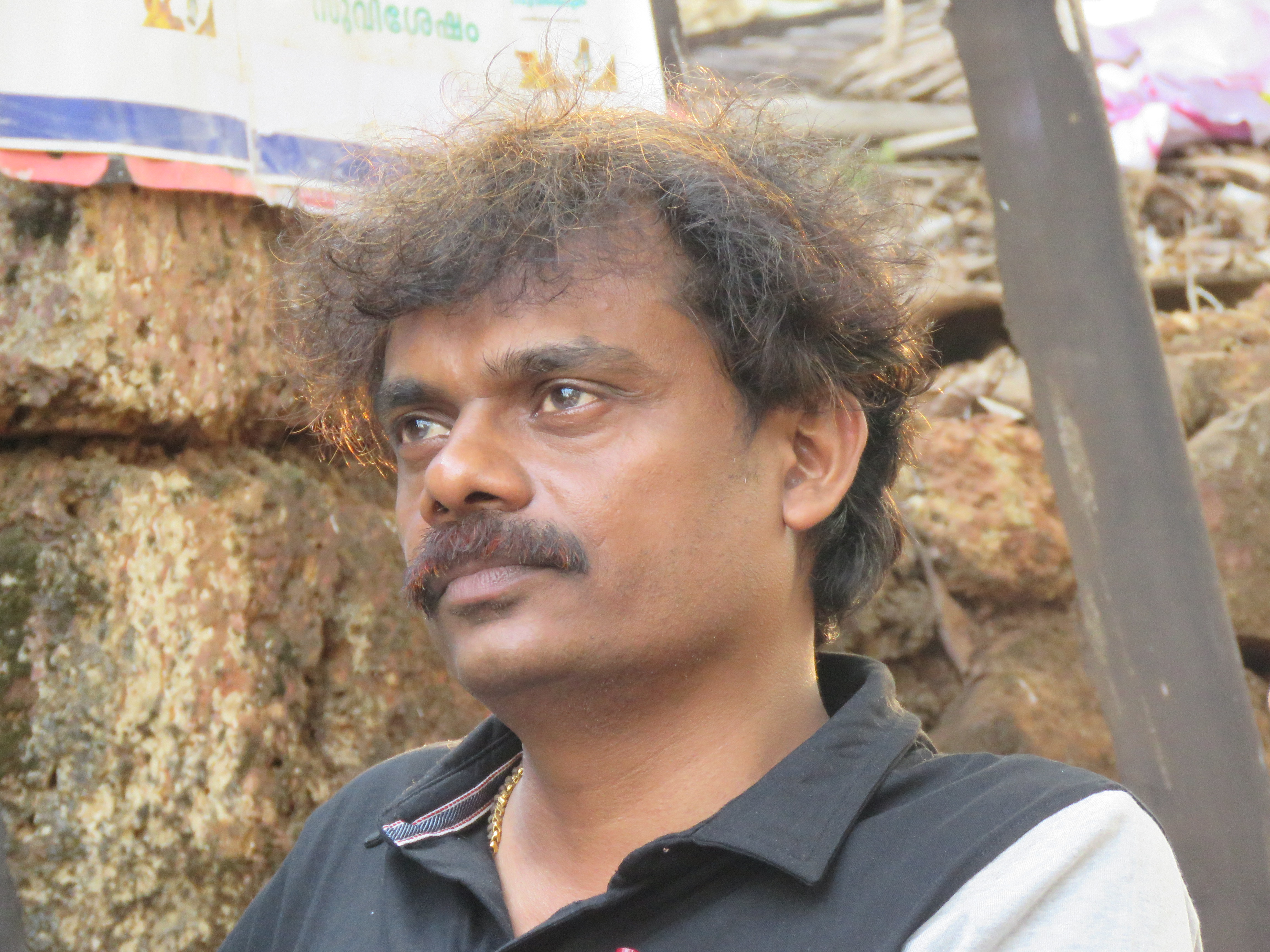 Photos by Vinayaraj